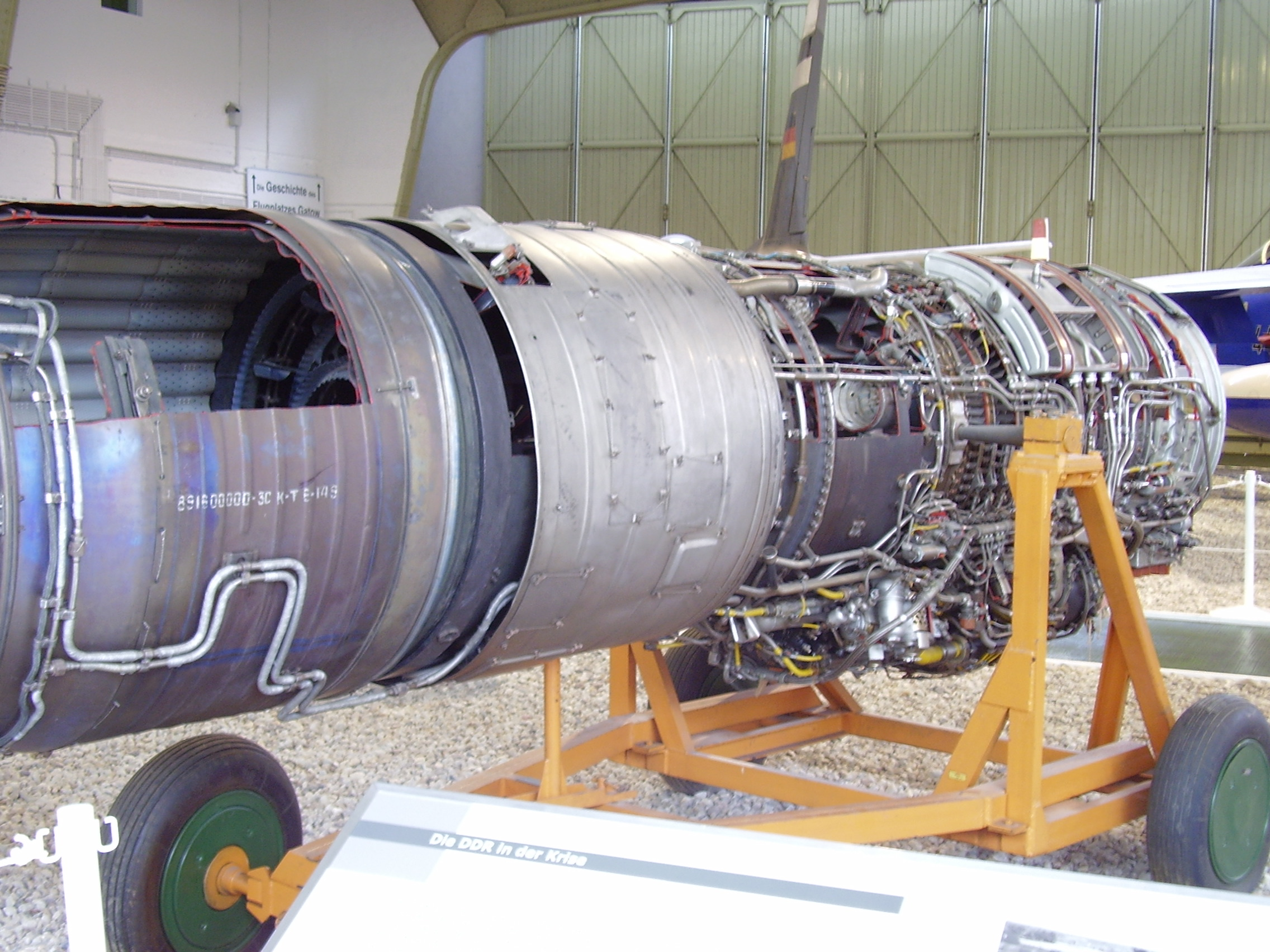 Luftwaffenmuseum der Bundeswehr; Airforce Museum of the Bundeswehr; Berlin-Gatow, Ljulka AL-21 F3